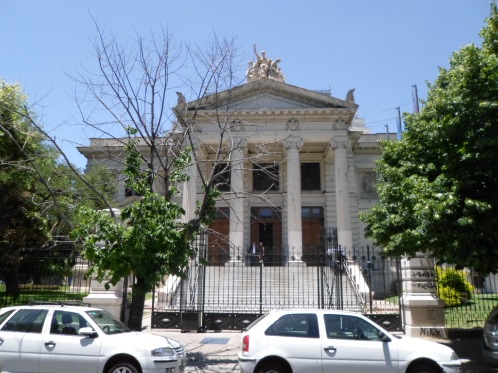 asasasasasas